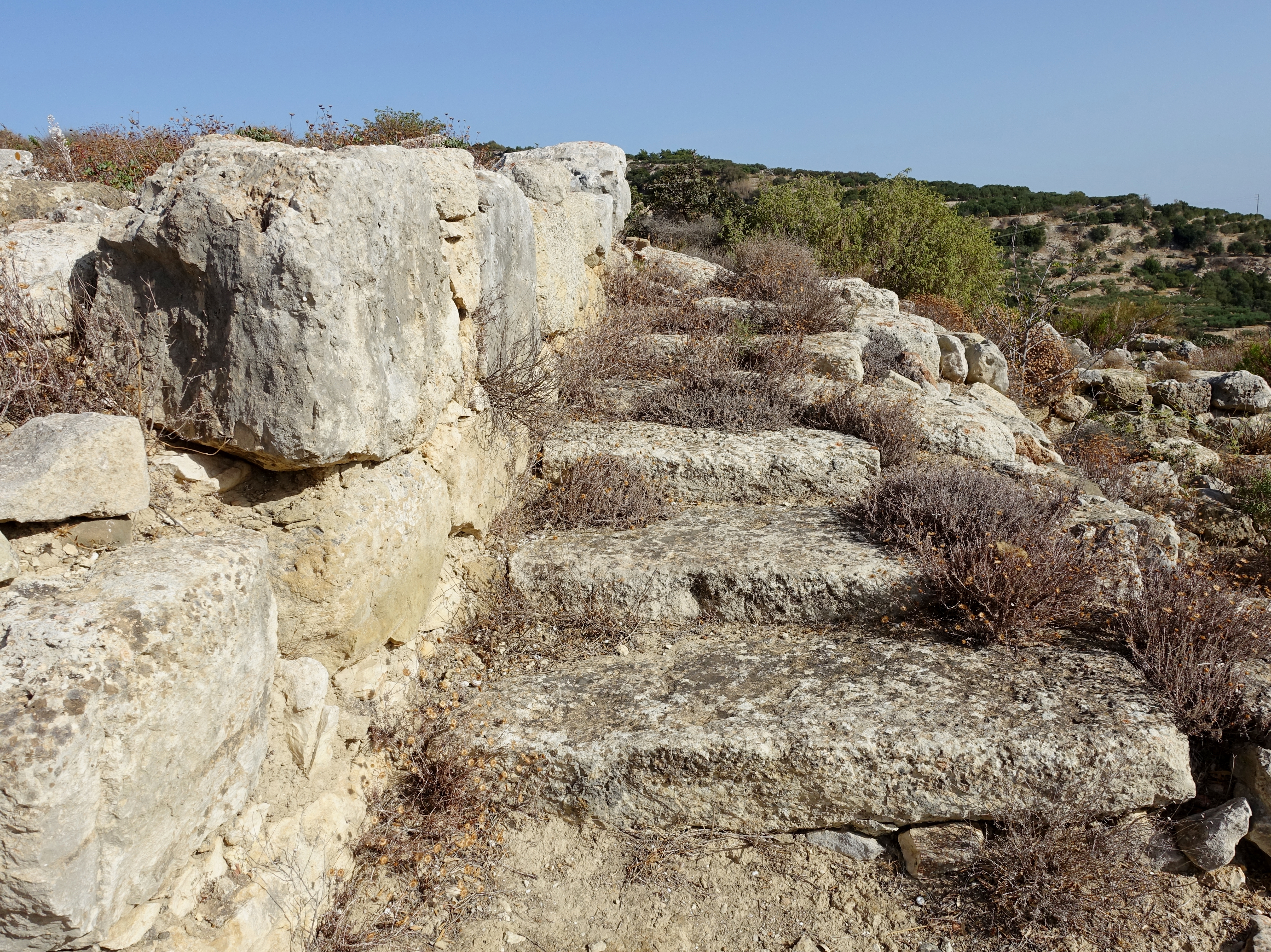 Minoischen Villa von Agios Georgios (Άγιος Γεώργιος), Gemeinde Sitia, Kreta, Griechenland